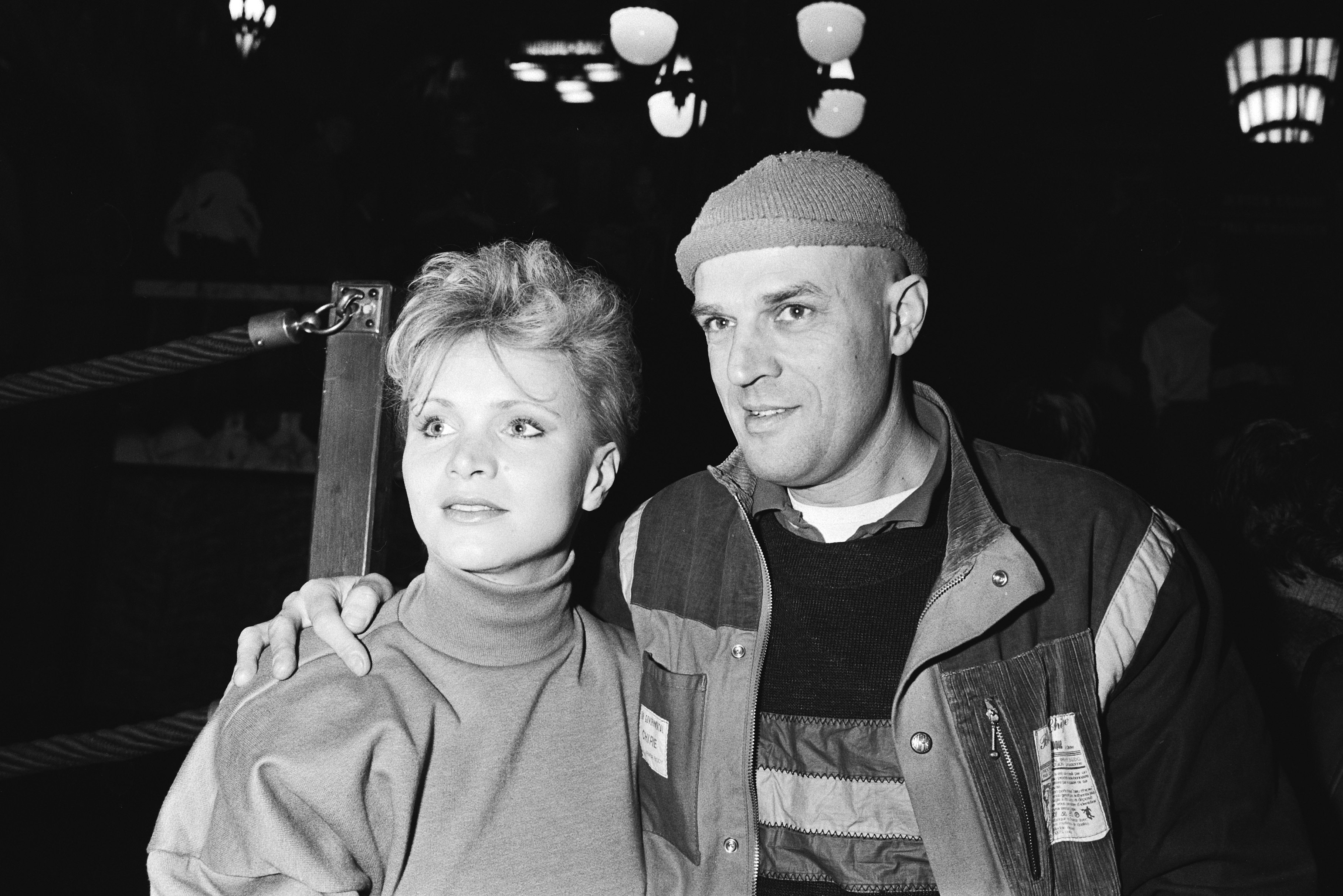 Collectie / Archief : Fotocollectie Anefo Reportage / Serie : Persvoorstelling van de Nederlandse film "De vierde man" Beschrijving : Renée Soutendijk (l) en Jeroen Krabbé Annotatie : 'De vierde man' is een boek van Gerard Reve Datum : 23 maart 1983 Trefwoorden : acteurs, actrices, groepsportretten, public relations, speelfilms Persoonsnaam : Krabbé, Jeroen, Soutendijk, Renée Fotograaf : Croes, Rob C. / Anefo Auteursrechthebbende : Nationaal Archief Materiaalsoort : Negatief (zwart/wit) Nummer archiefinventaris : bekijk toegang 2.24.01.05 Bestanddeelnummer : 932-5421